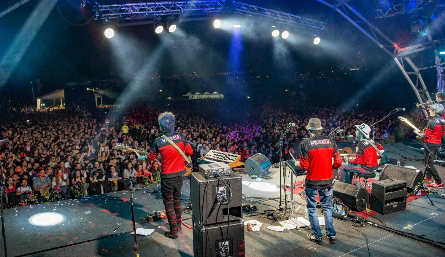 Momentos destacados de la programación cultural de San Isidro 2017